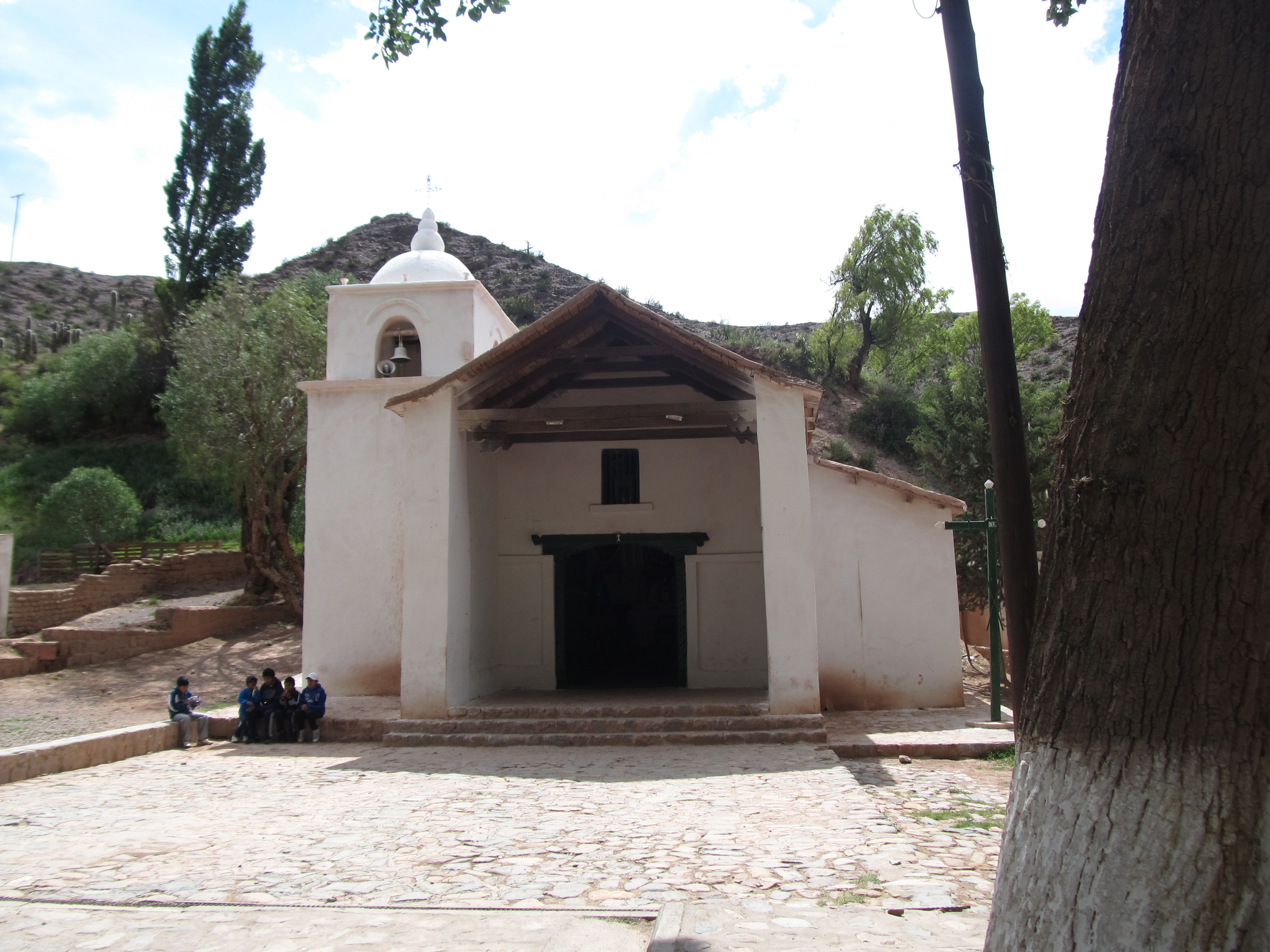 Capilla de Huacalera